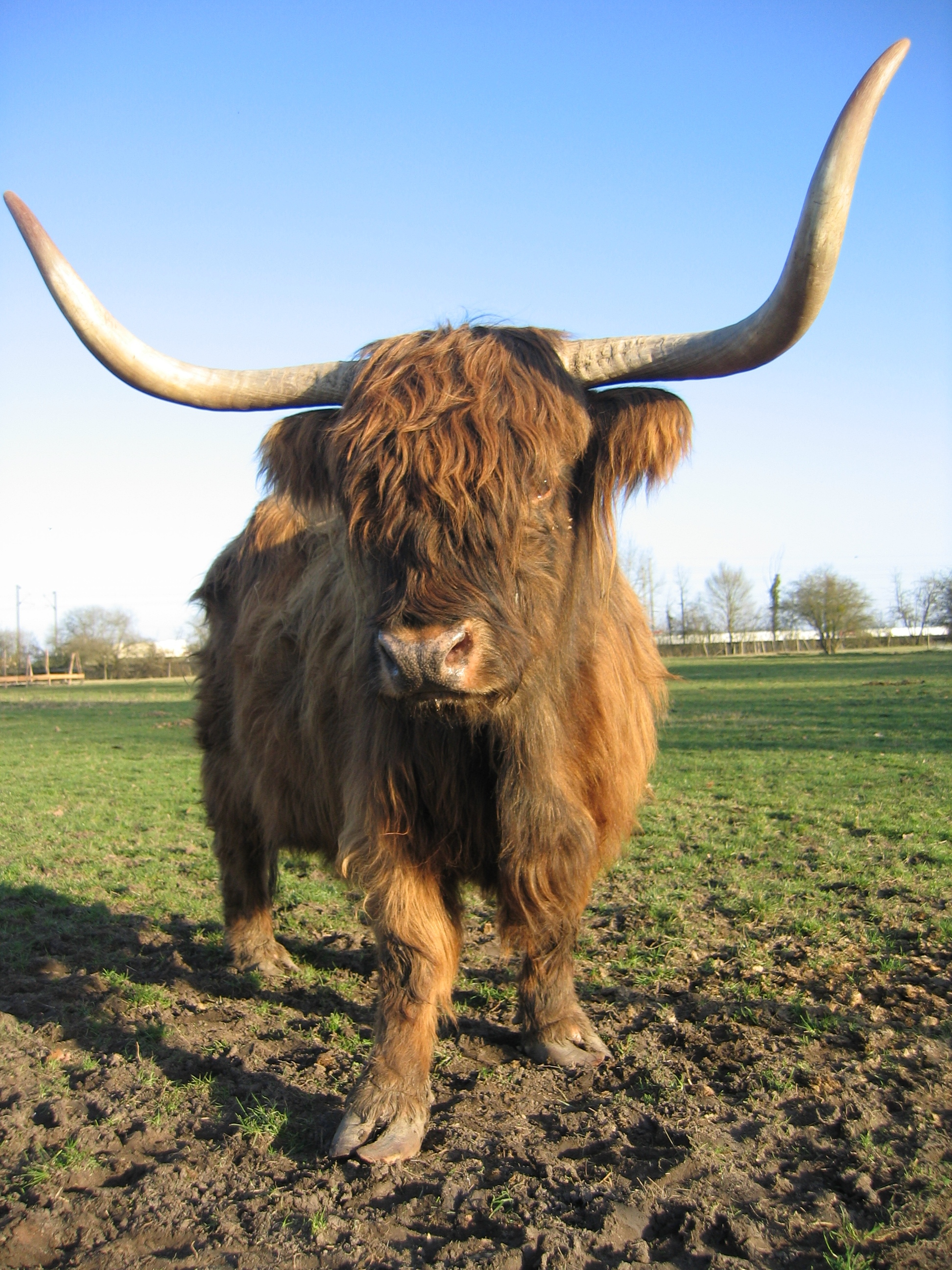 Vache highland à la ferme de Port Aubry, Nièvre.